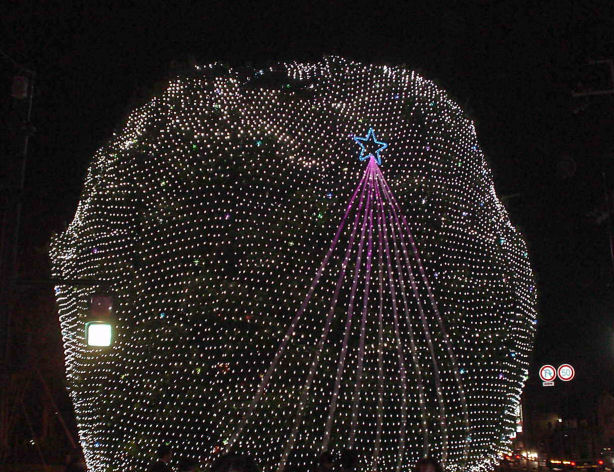 년말 장식